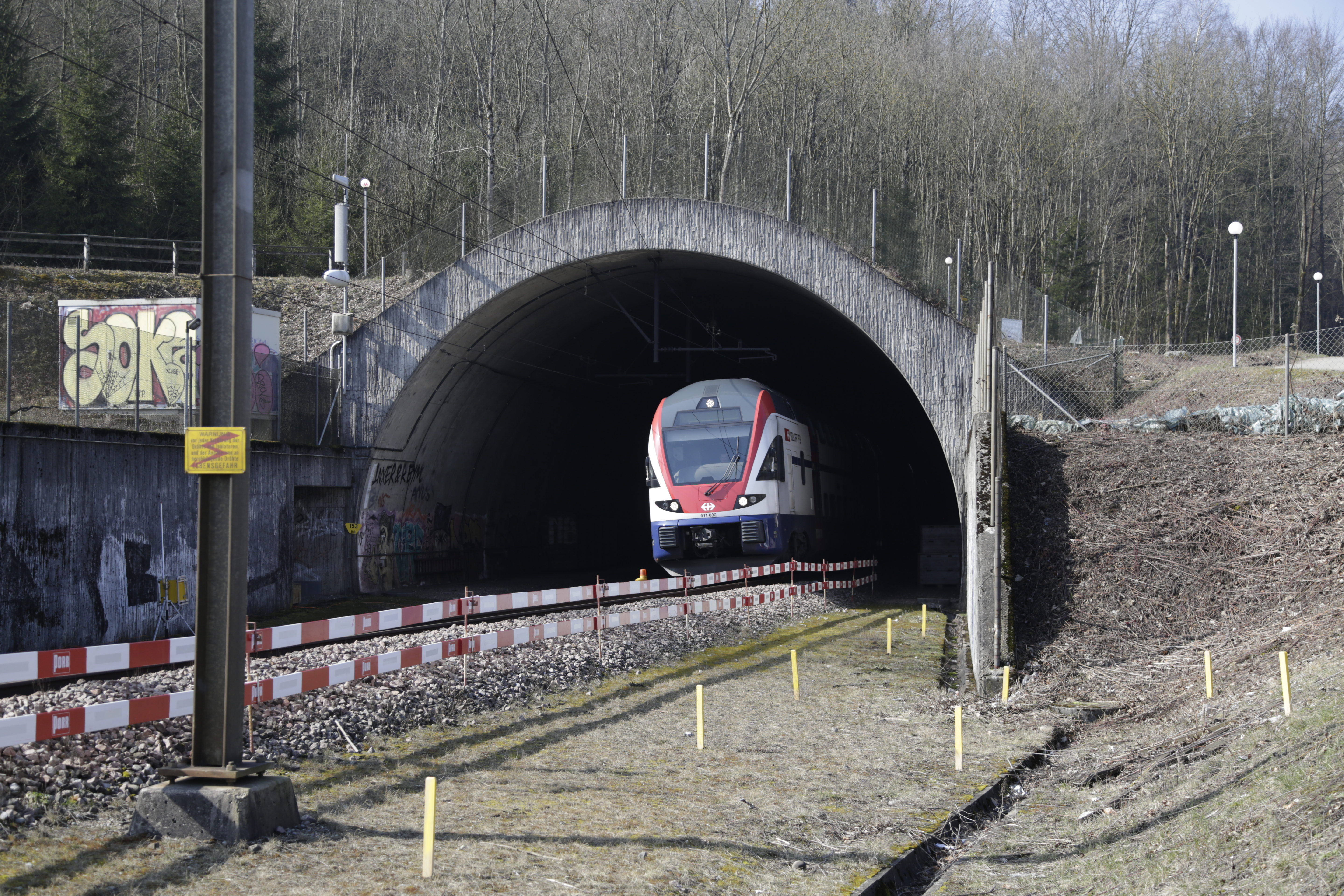 Das östliche Tunnelportal des Hagenholztunnel